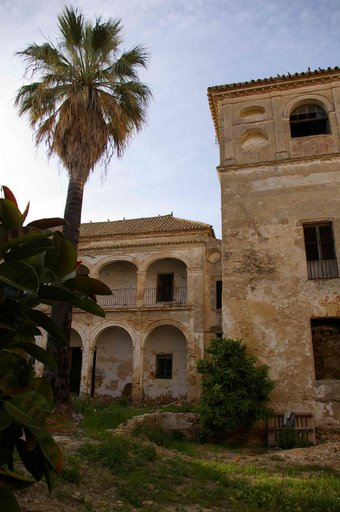 Interior de la Casa de Arizón en Sanlúcar de Barrameda